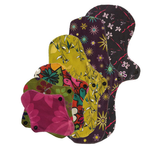 Photo de serviettes hygiéniques lavables de différentes tailles